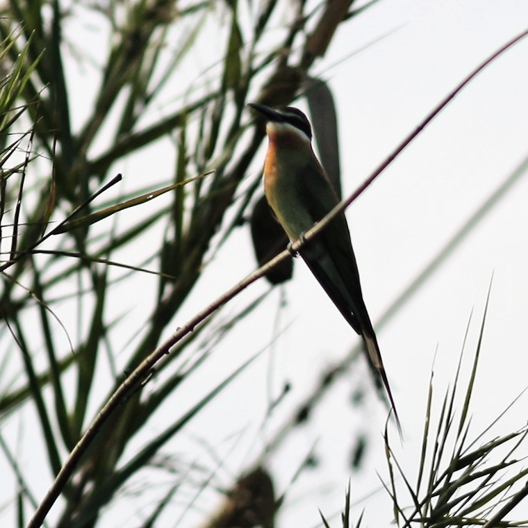 Madagascar Bee-eater (Merops superciliosus)